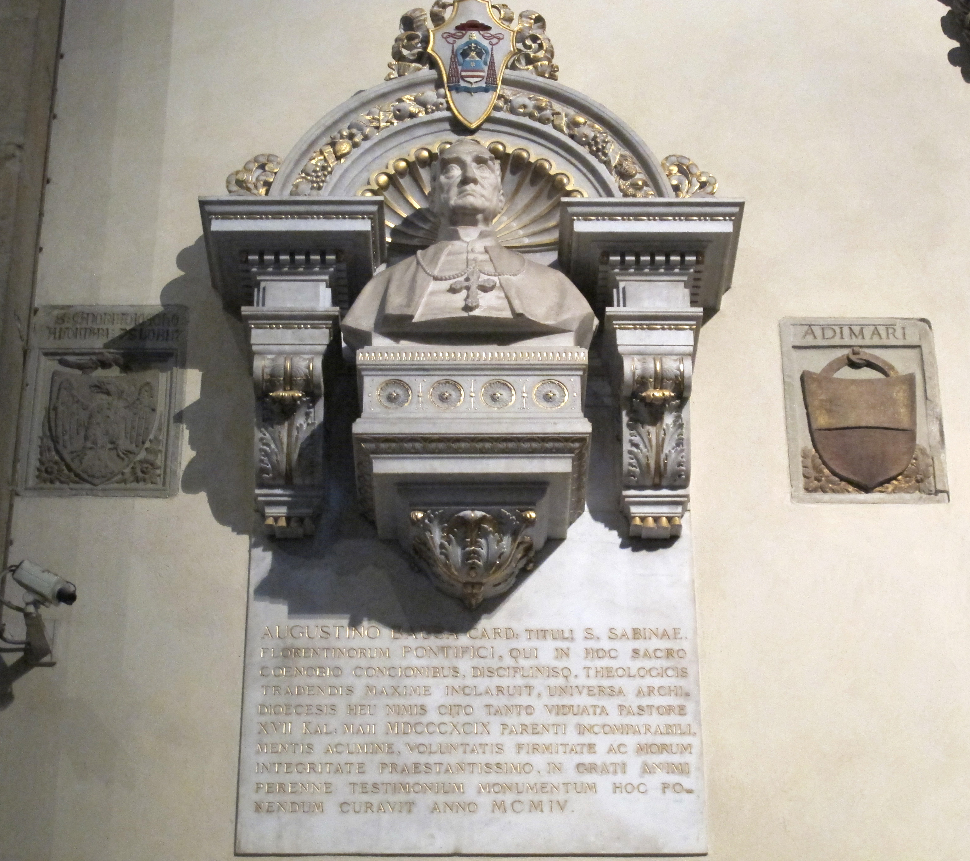 Smn, navata dx, cesare zocchi, busto di agostino bausa, 1904